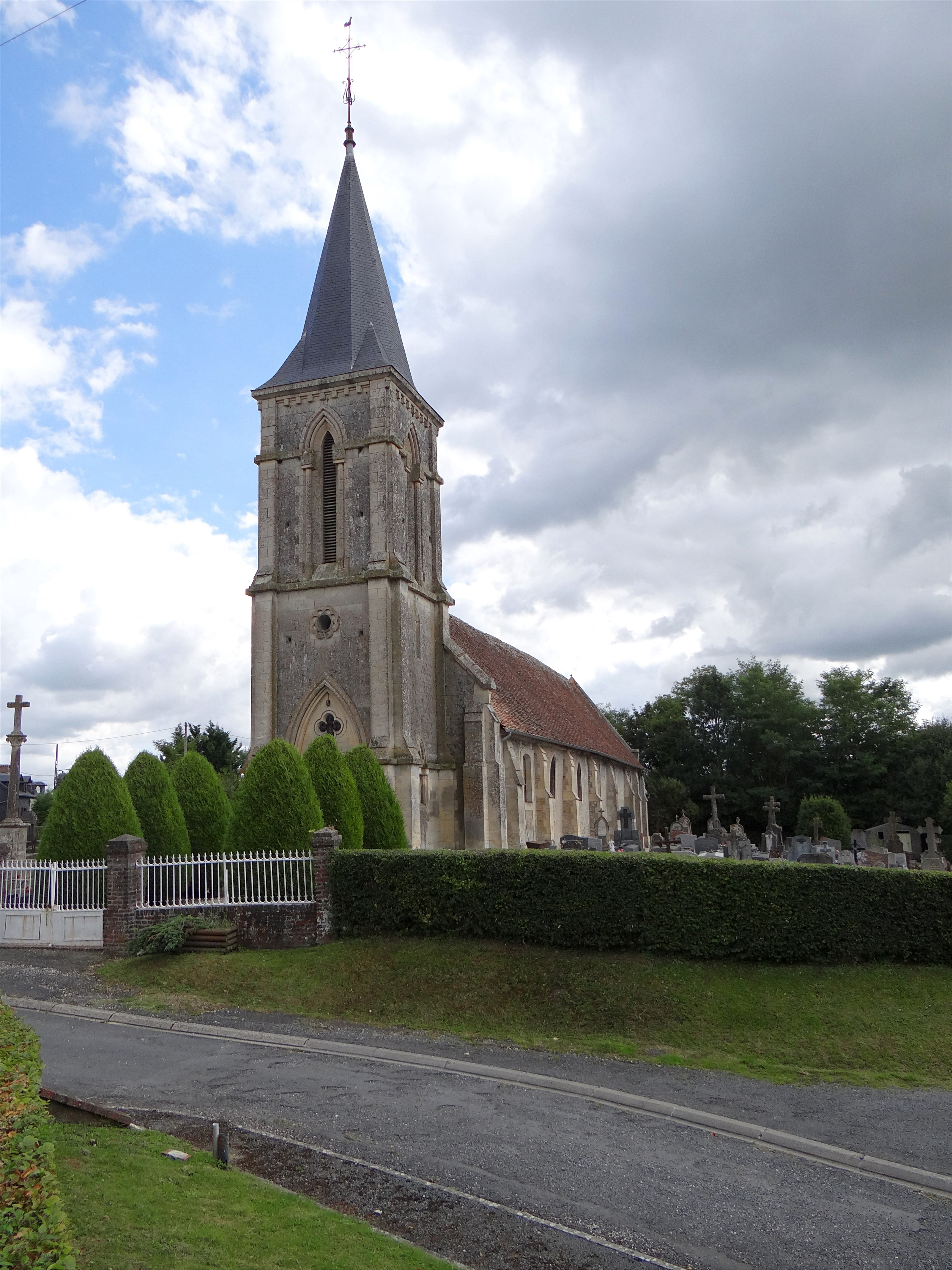 L'église Notre-Dame de Beaufour, à Beaufour-Druval, Calvados, France.